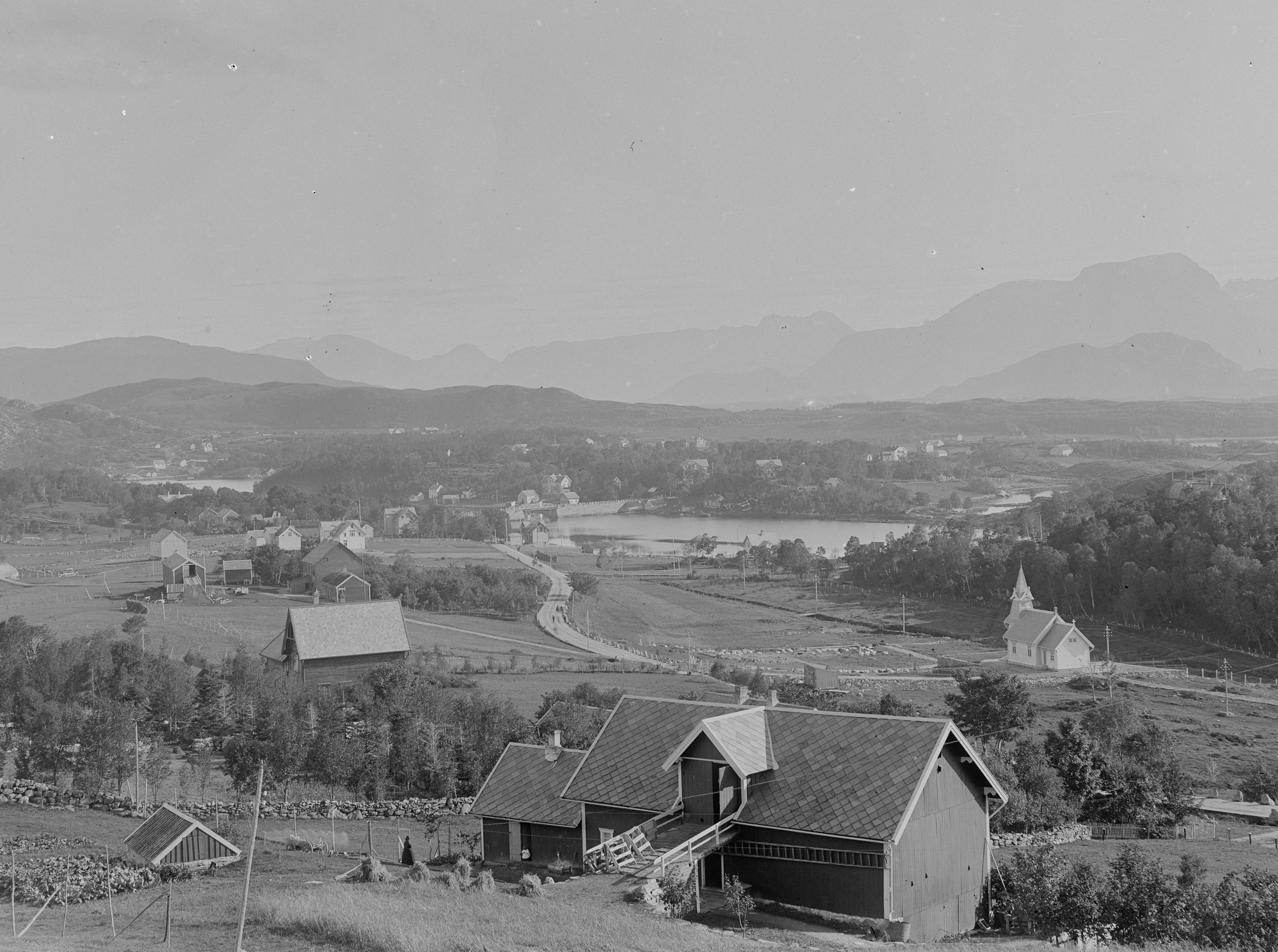 Bildet er hentet fra Arkivverket. Oversikt I, Norvesund, Romsdals amt Arkivinstitusjon : Riksarkivet Arkivnavn : Havnedirektoratet Sted : Norge, Møre og Romsdal, Ålesund, Nørvesund Emneord: Landskap Avbildet: Nørvasund, Nørve kirkegård